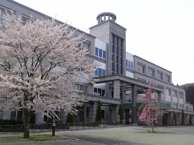 東北文化学園大学